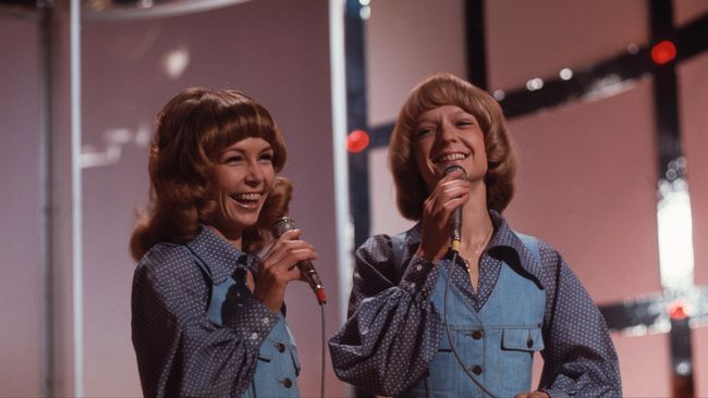 Kerstin Aulen & Mona wessman i melodifestivalen 1973